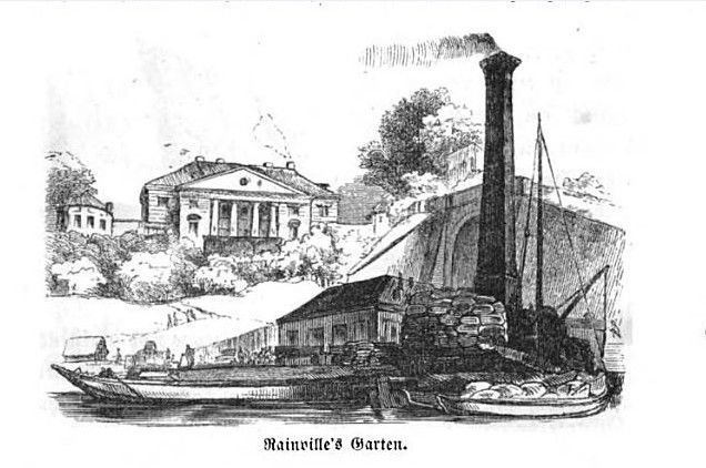 Am Ende des Altonaer Hafens läuft ein Gleis der Kieler Eisenbahn den Berg herunter und verbindet hier die Elbe mit der Ostsee. Die beladenen Wagen werden durch eine Dampfmaschine an Drathseilen den Berg herauf und hinabgezogen, und die Güter direct aus den Schiffen in die Transportwagen geladen. Hart neben der Eisenbahn liegt am Hügelabhang der bekannte Vergnügungsort Rainville's Garten, von wo aus man eine reizende Aussicht über die Elbe hat. Von hier an beginnt die Zollgrenze für das Herzogthum Holstein, auch liegt hier mitten im Strome das dänische Wachtschiff, das früher dem Köhlbrand gegenüber lag.